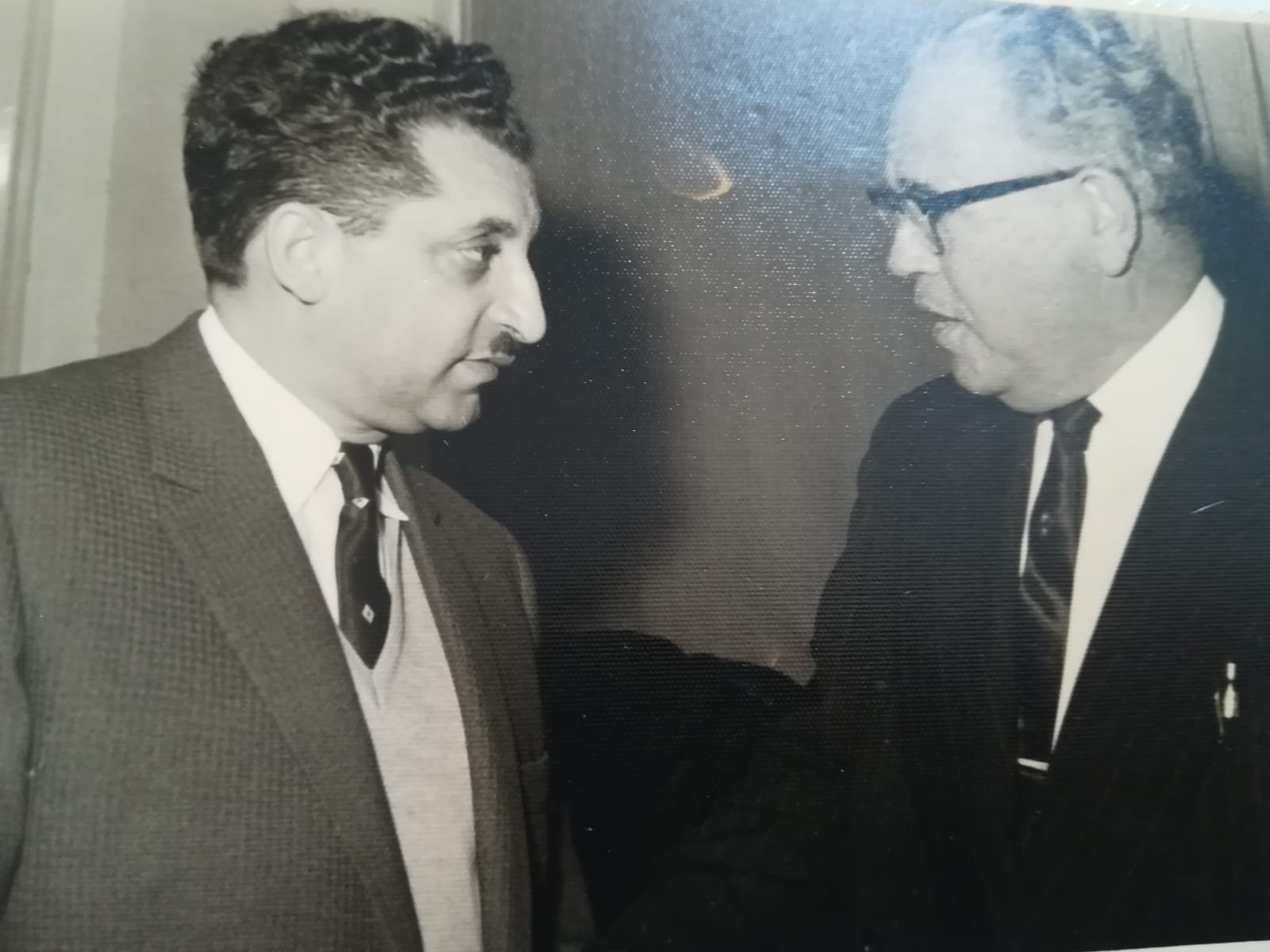 מימין: ד"ר אריה אלוטין, מנדל סטבורובסקי, צולם בתחילת שנות ה-60